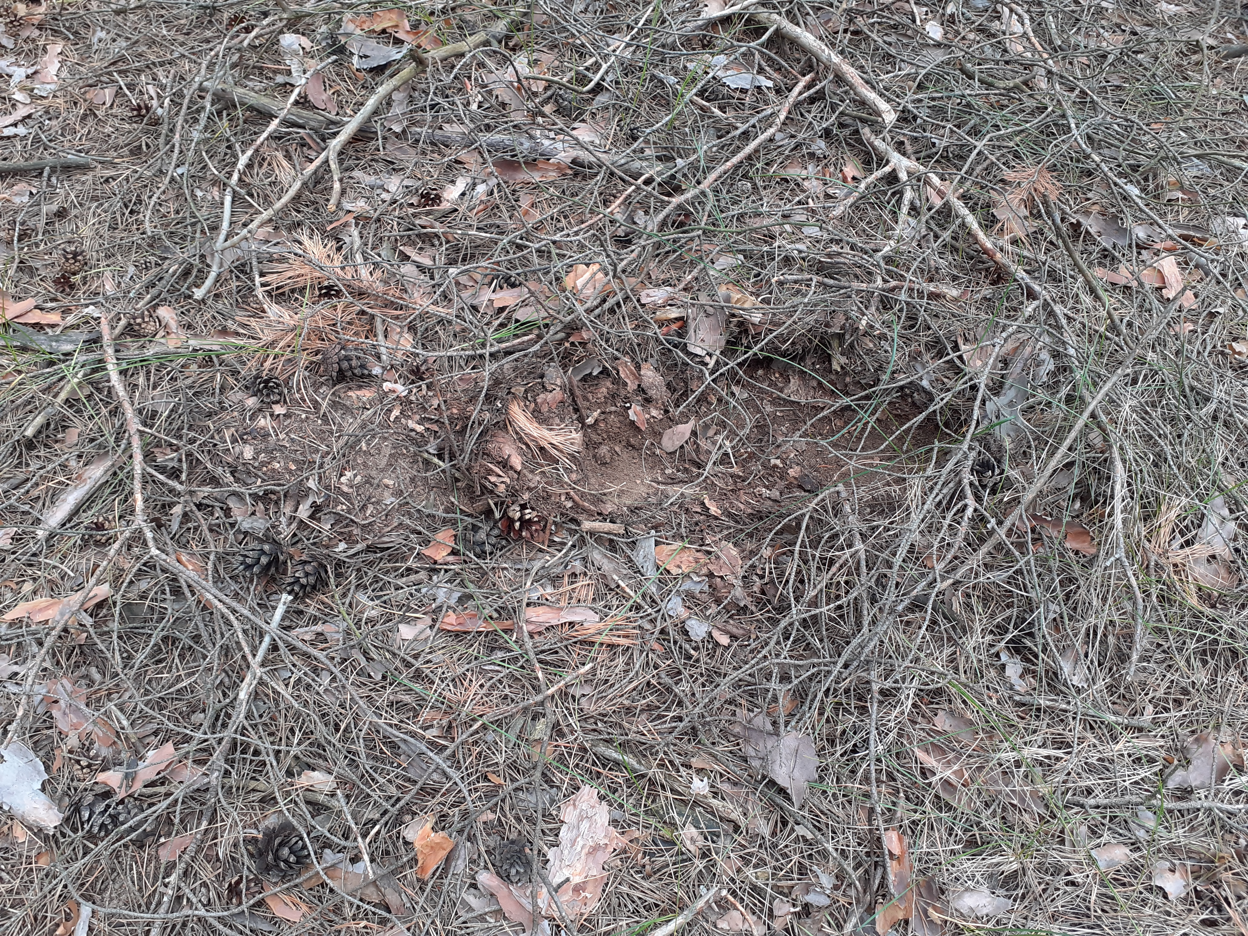 Ямка, яку зробив заєць для відпочинку